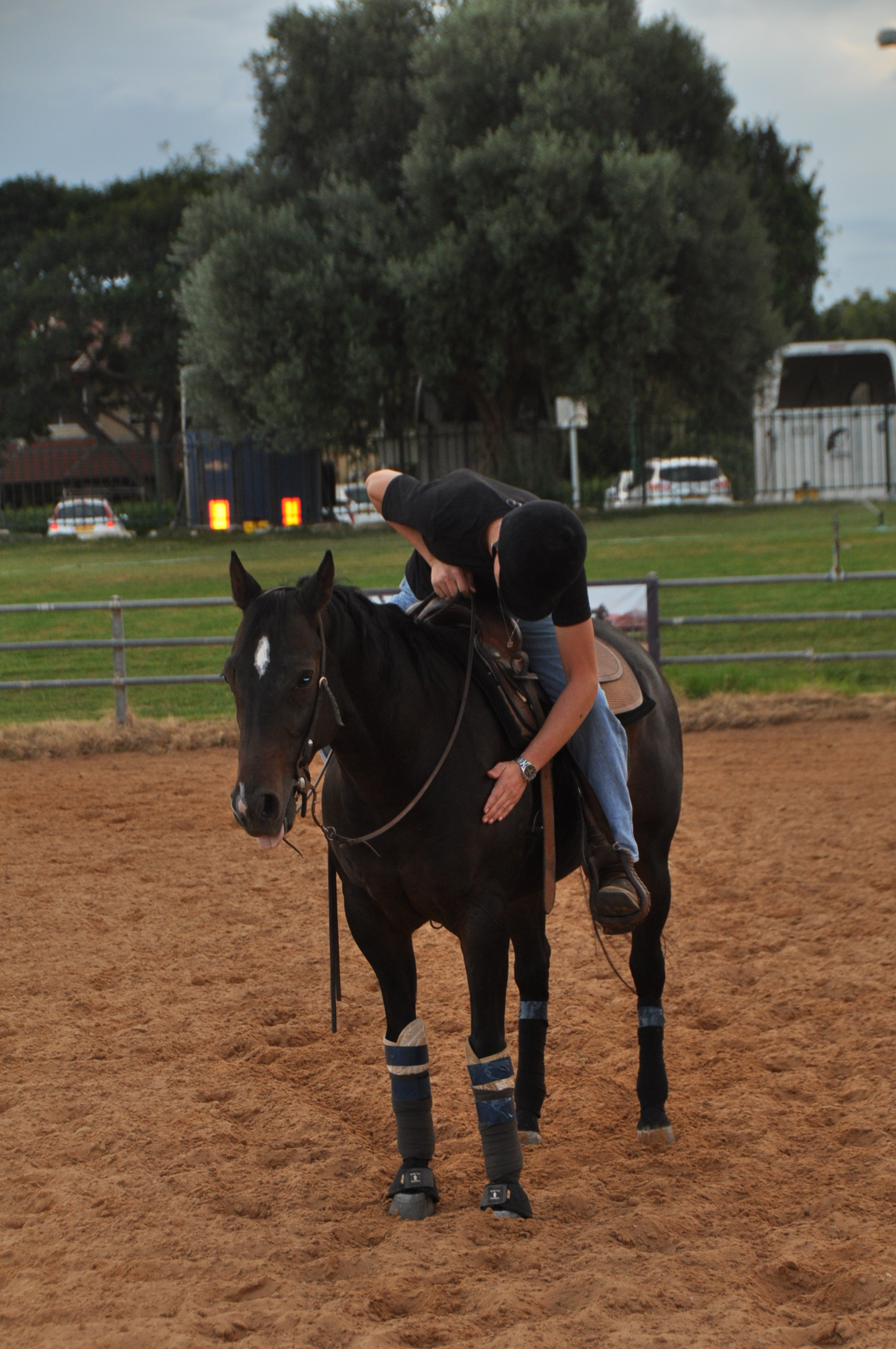 התודה של הרוכב על הסוס